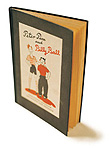 Peter, Pim & Billy Ball - Deutschlands erstes Englischbuch für Volksschüler nach dem Zweiten Weltkrieg